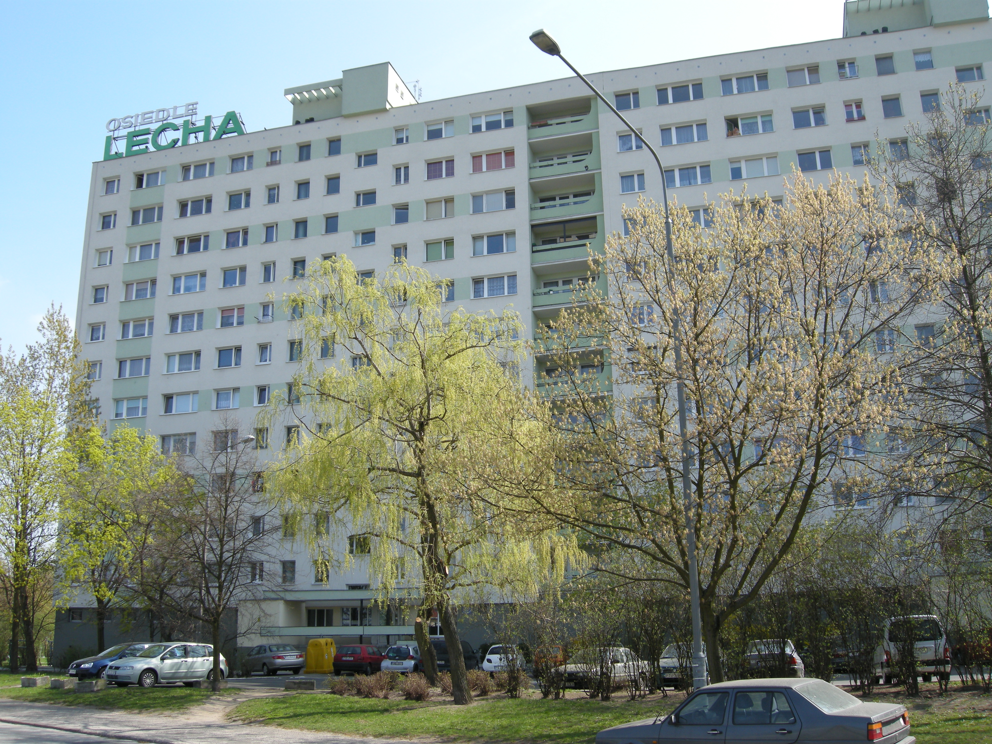 Osiedle Lecha w Poznaniu.